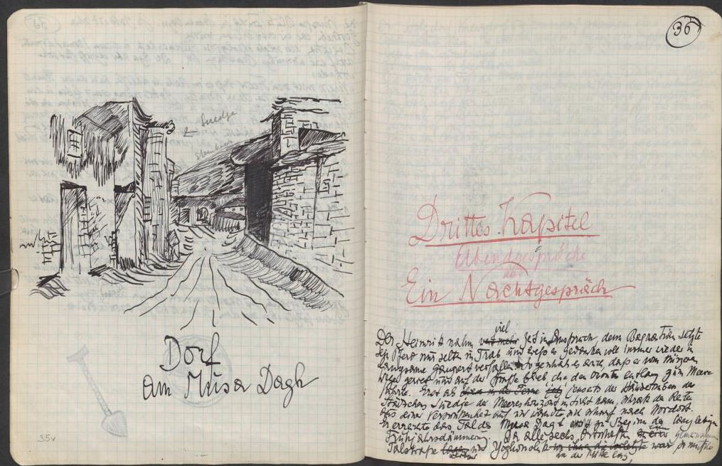 Manuskriptentwurf Franz Werfel: Musa Dagh. Literaturmuseum der Österreichischen Nationalbibliothek